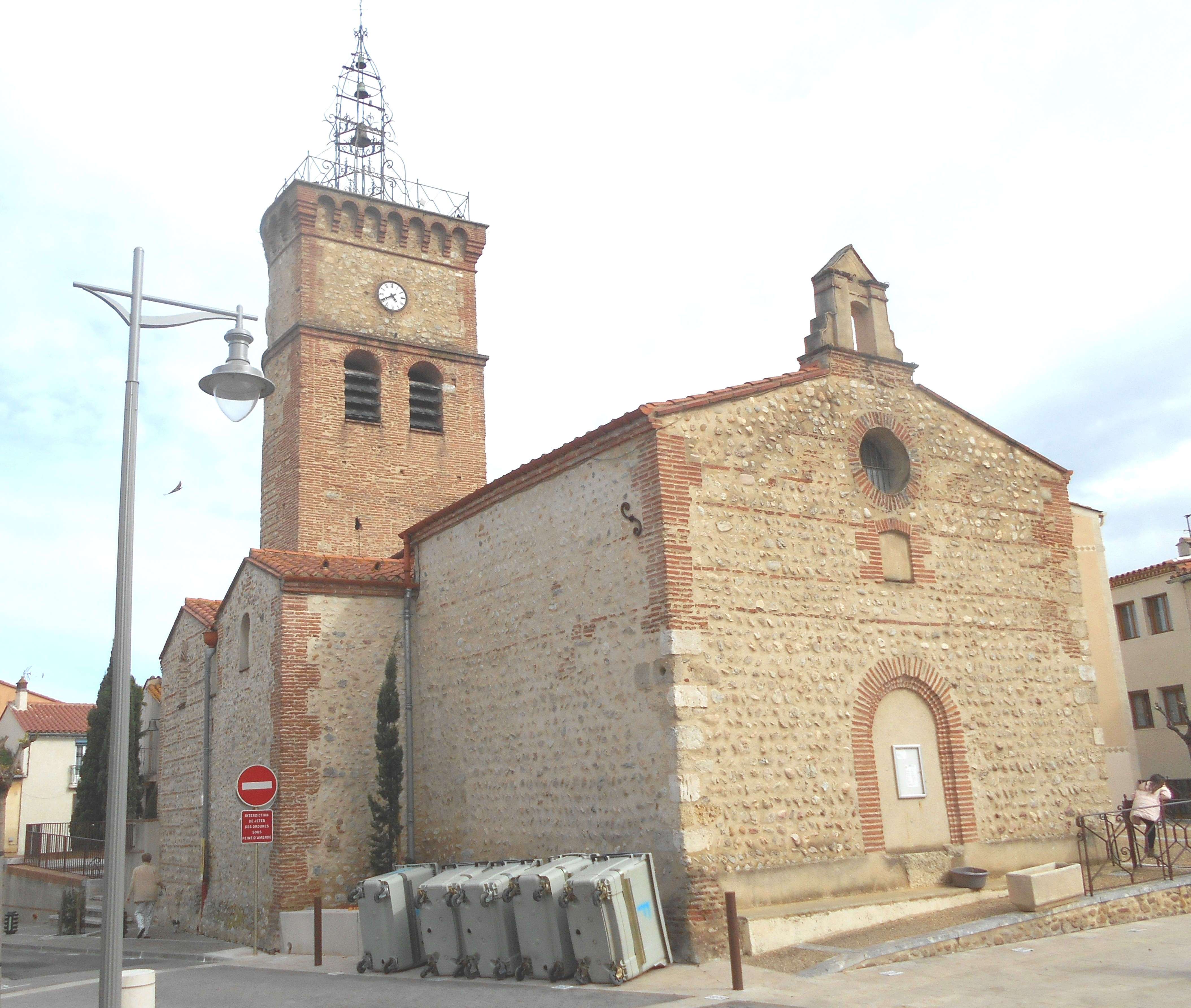 Sant Jaume de la Torre d'Elna